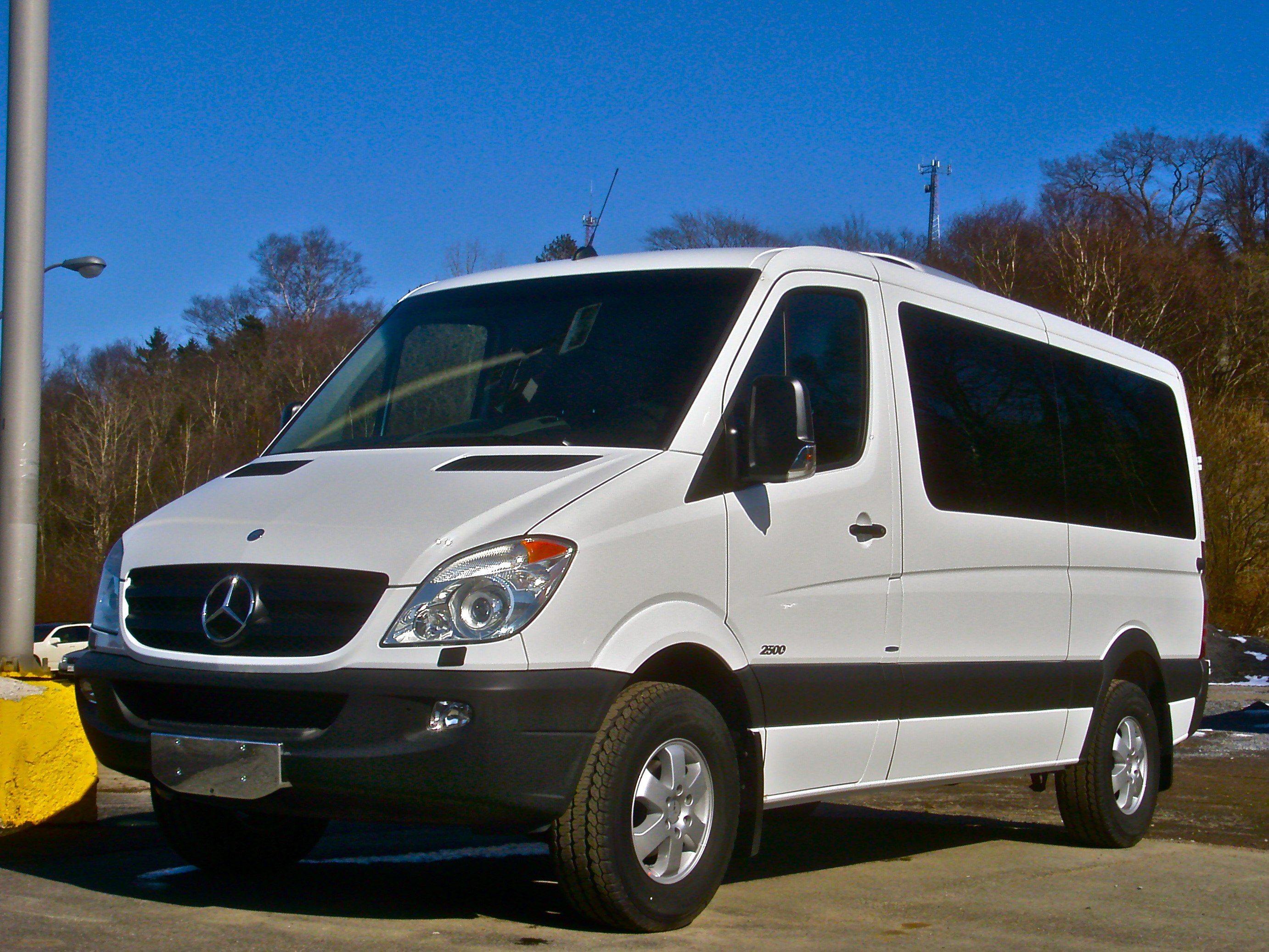 2010 Mercedes-Benz Sprinter 2500 Passenger Van (W906).